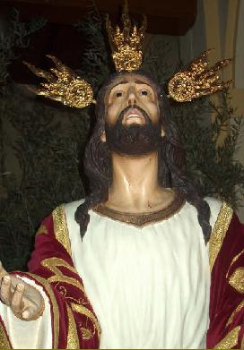 Oración de Jesús en el Huerto